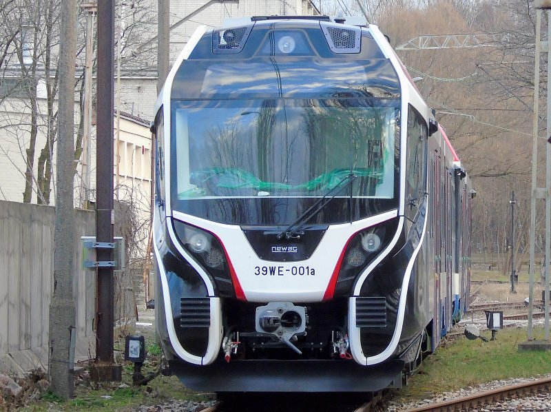 Elektryczny zespół trakcyjny 39WE-001 dla Warszawskiej Kolei Dojazdowej podczas testów homologacyjnych na terenie Instytutu Kolejnictwa w Warszawie.